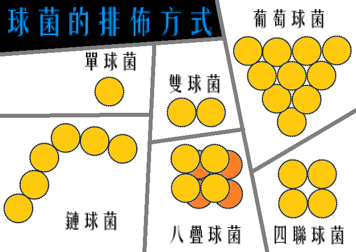 球菌的各種排佈方式